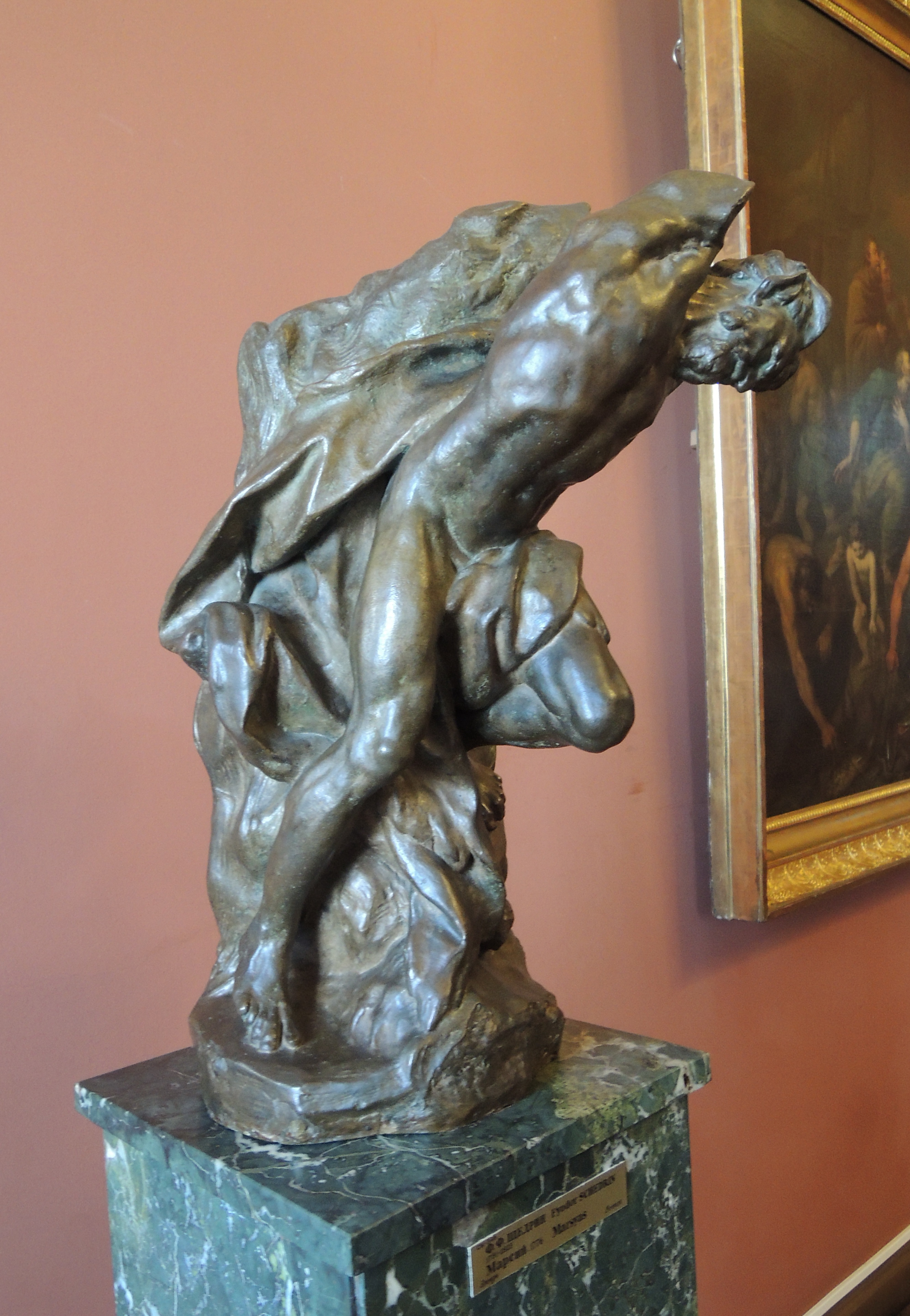 Ф. Щедрин. «Марсий», 1776, ГРМ